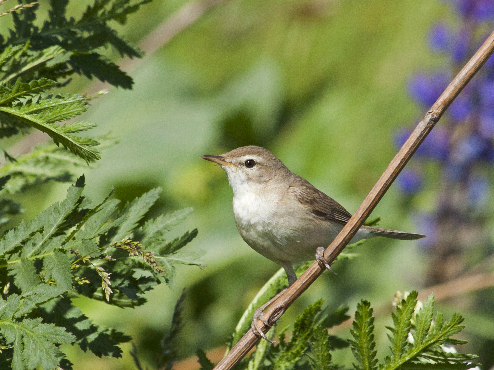 Павловский район Нижегородской области This image is related to the protected area of Russia number 5210432